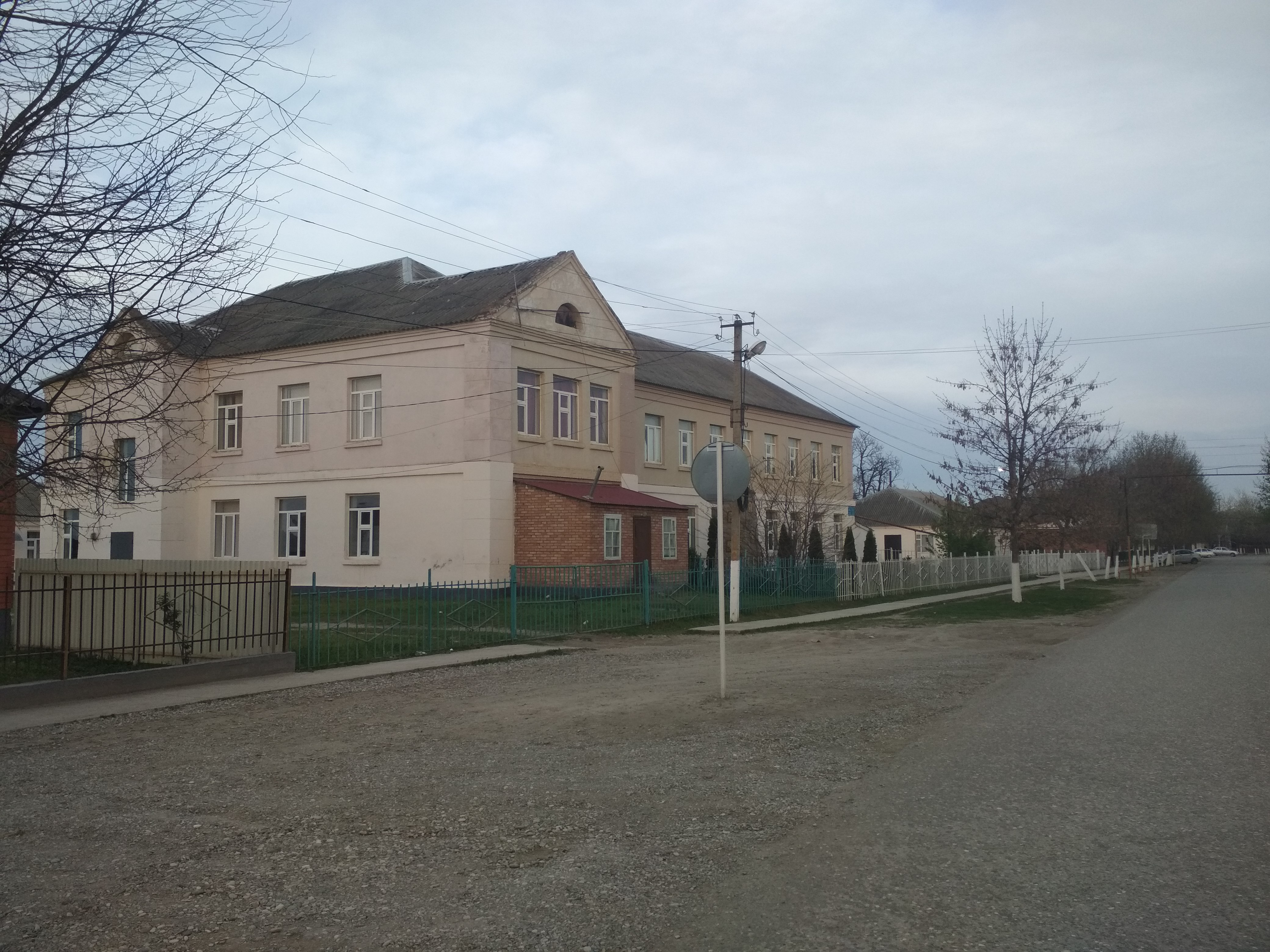 Нохчийн: Лаха Нерен №2 йолу ишкол